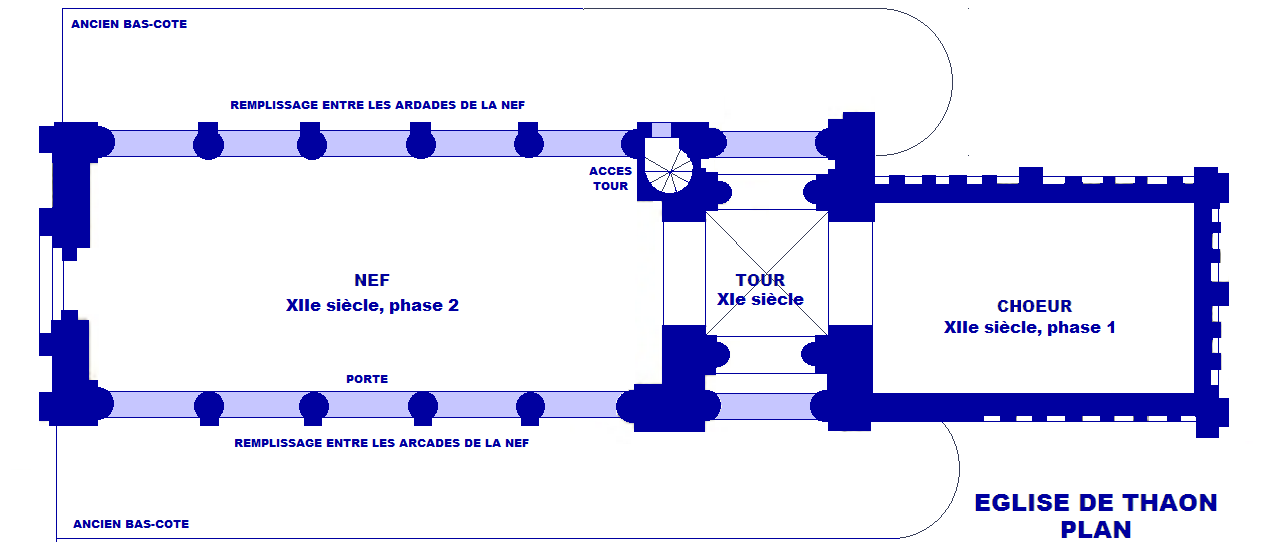 Eglise de Thaon, Calvados, Plan